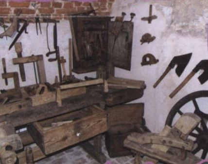 Śląsk bez granic mapa